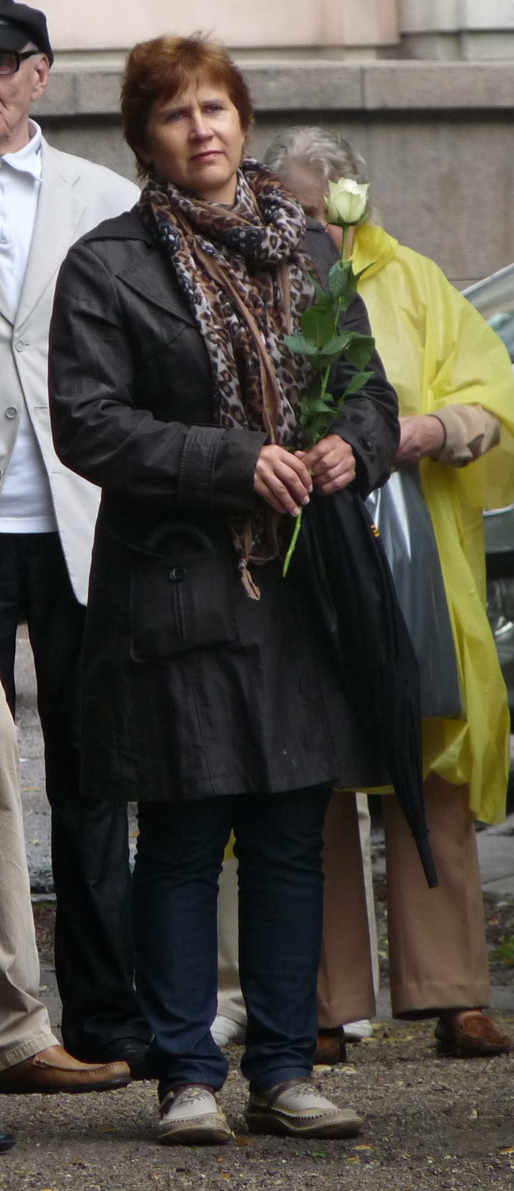 Tartu abilinnapea Tiia Teppan Eesti taasiseseisvumispäeva tähistamisel Tartu vabadussamba juures, 20. august 2012